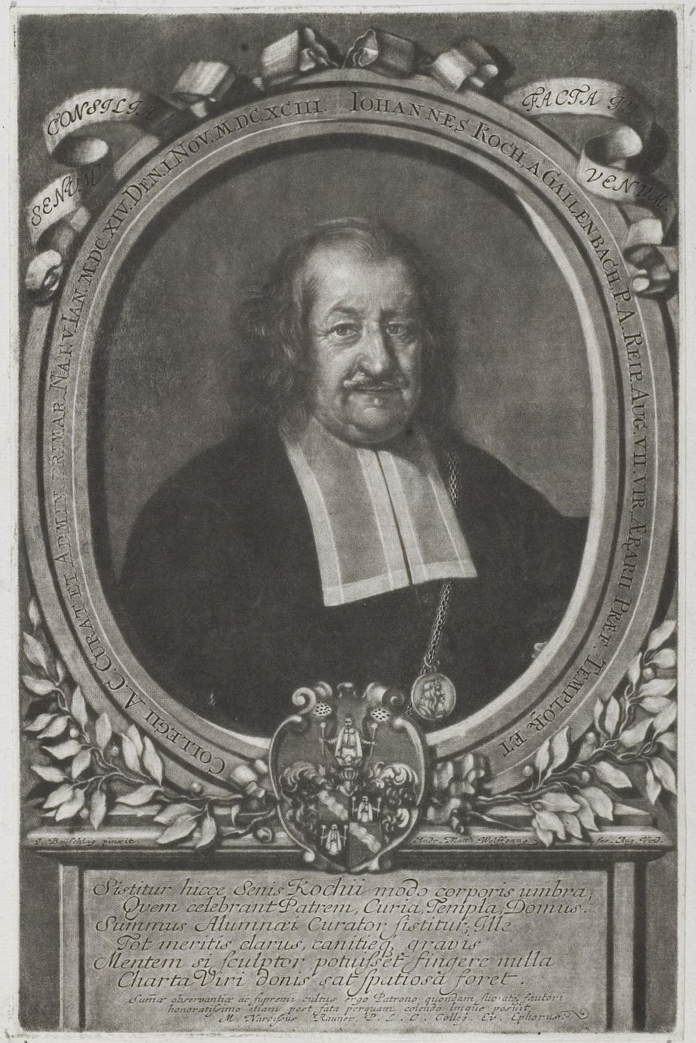 Grafik aus dem Klebeband Nr. 3 der Fürstlich Waldeckschen Hofbibliothek Arolsen Motiv: Johannes Koch von Gailenbach (1614–1693), Augsburger Patrizier, Oberkirchenpfleger und Geheimer Rat